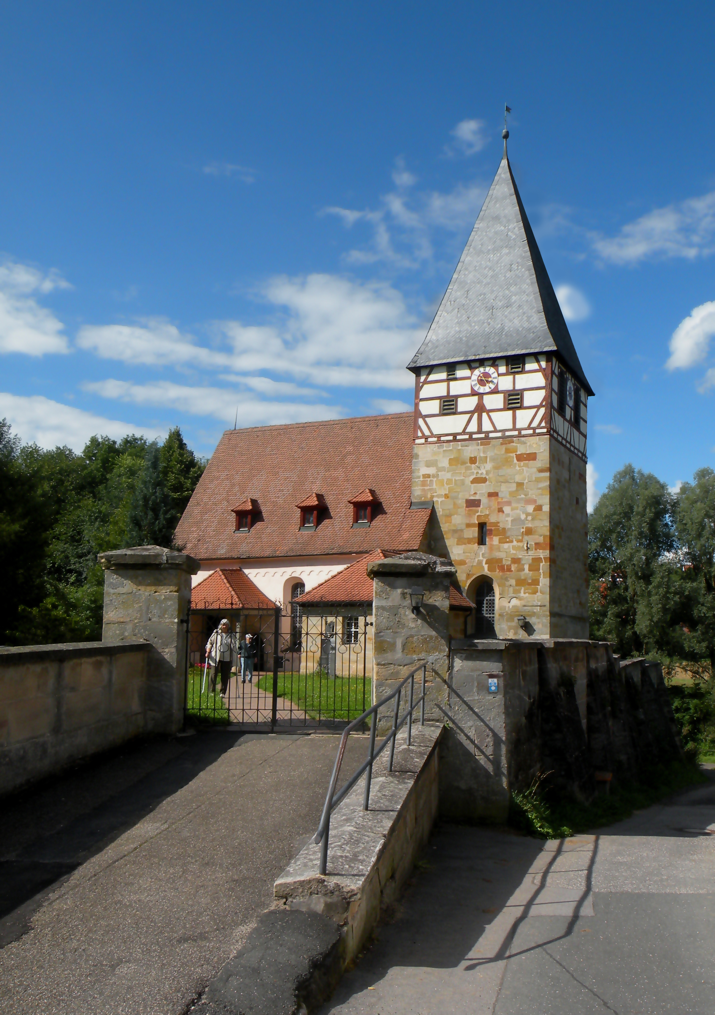 St.Michaelskidche von Rasch (Altdorf)